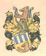 Wappen der Sippe von Preu, verliehen am 28. Maerz 1538 vom Koenig und nachmaligen Deutschen Kaiser des Heiligen Römischen Reiches Ferdinand I in Prag